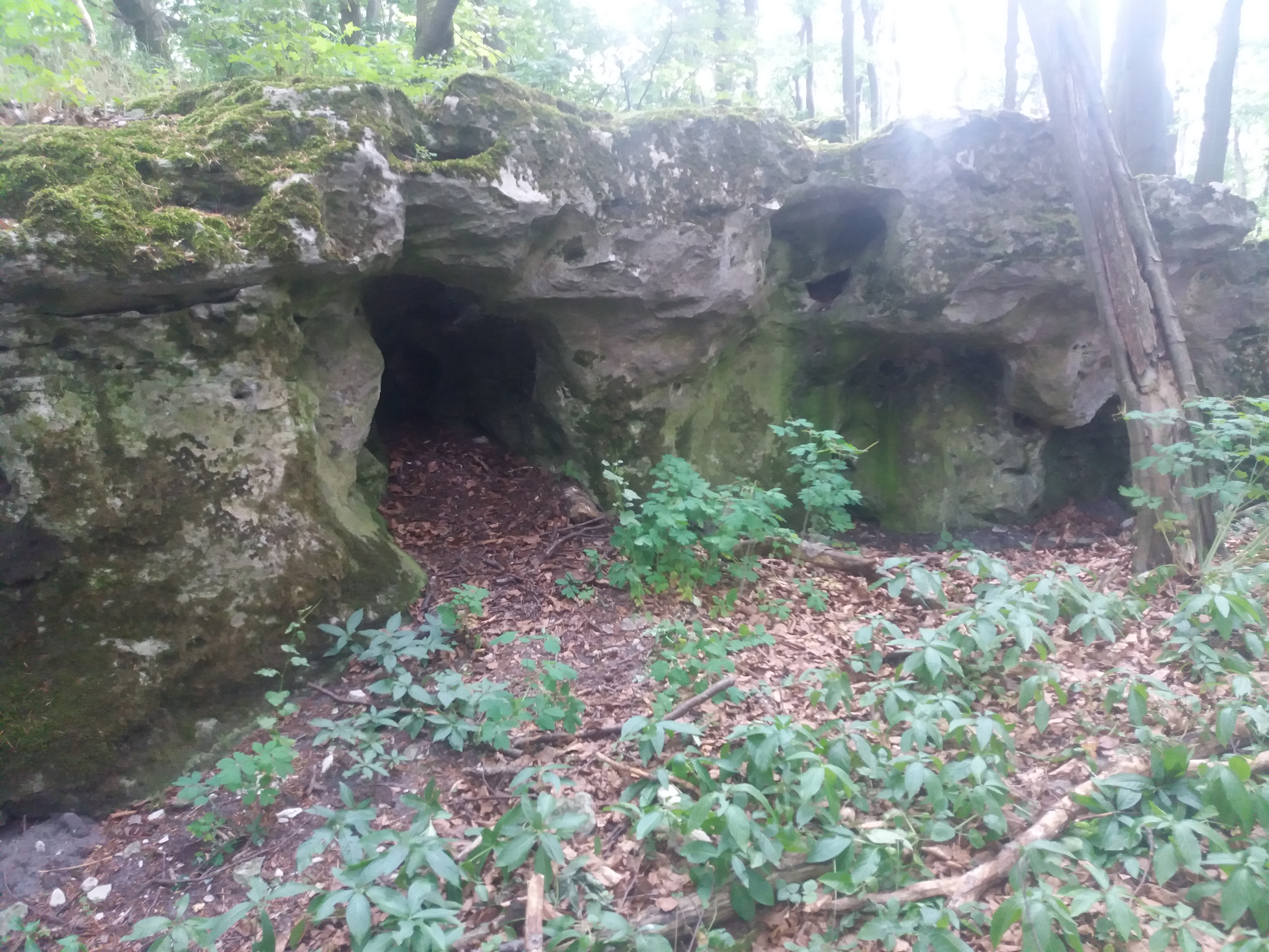 Городище давньоруське, Пеняки, 3 км на захід від села, в урочищі Коло кринички, за 0,1 км на південь від колишнього польського села Гута Пеняцька, на вершині пагорба порослого лісом